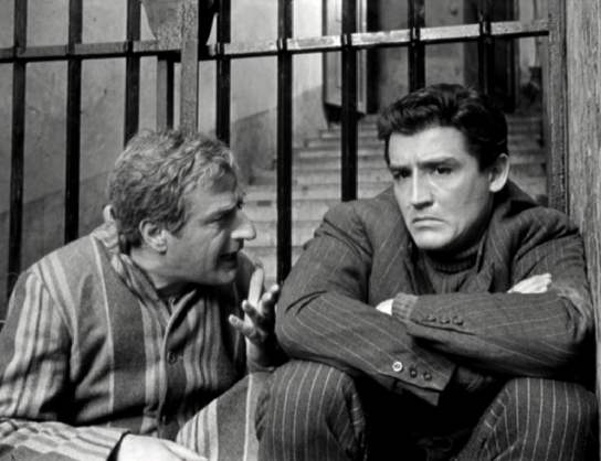 Screenshot dal film I soliti ignoti